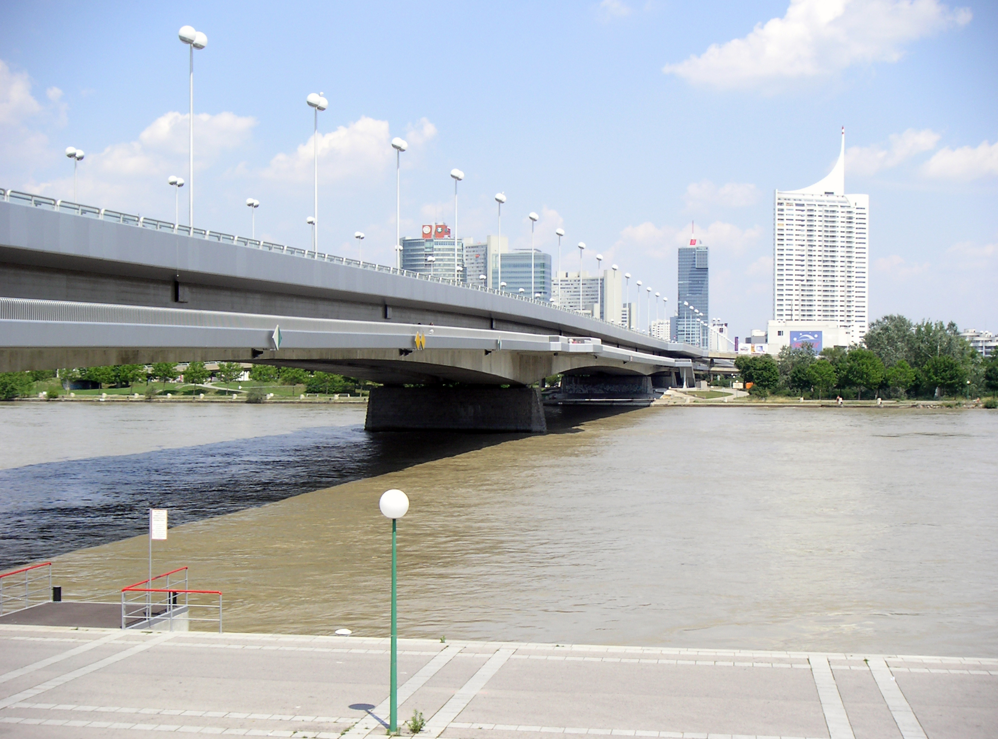 Reichsbrücke in Vienna, Austria; view from right shore.